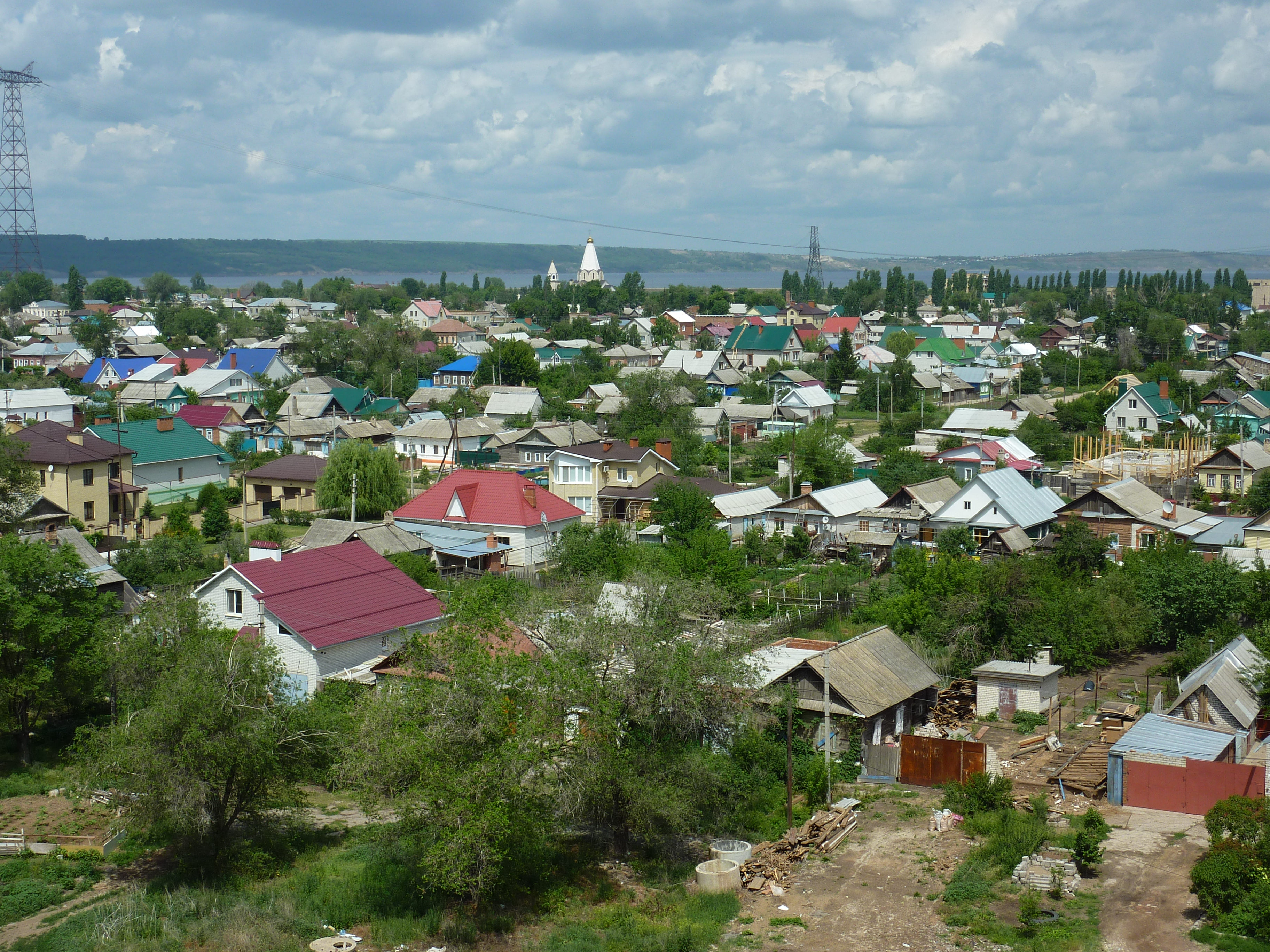 Балаково